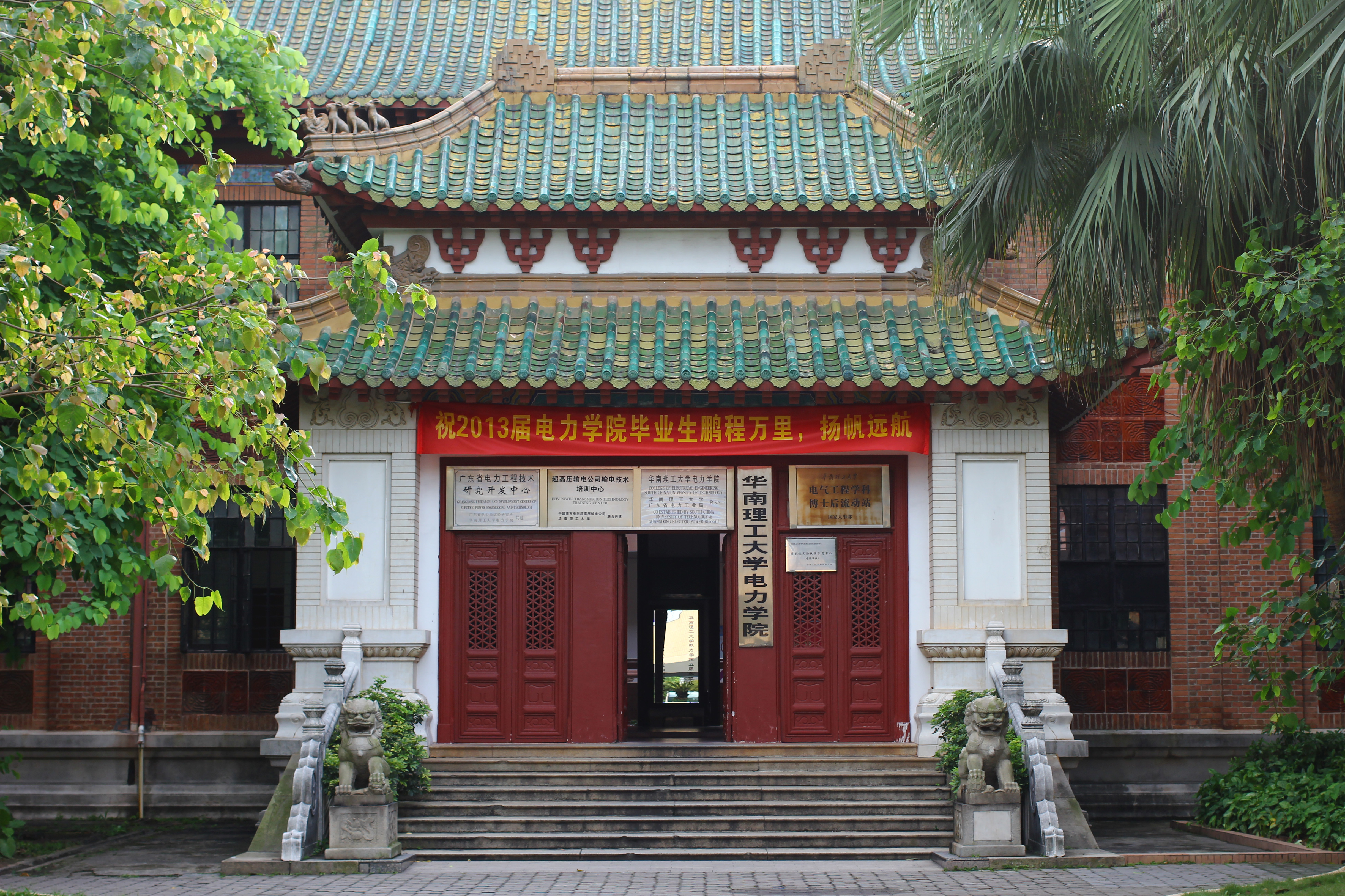 華南理工大學9號樓電力學院院樓，原爲國立中山大學土木工程教室。